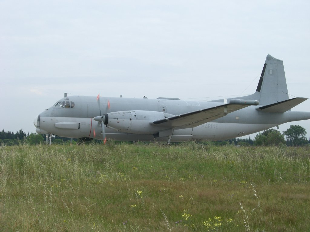 Bréguet Atlantique 2